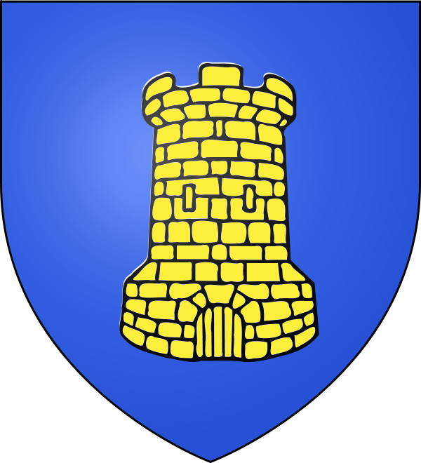 Blason de Mouans-Sartoux, commune des Alpes-Maritimes, France.